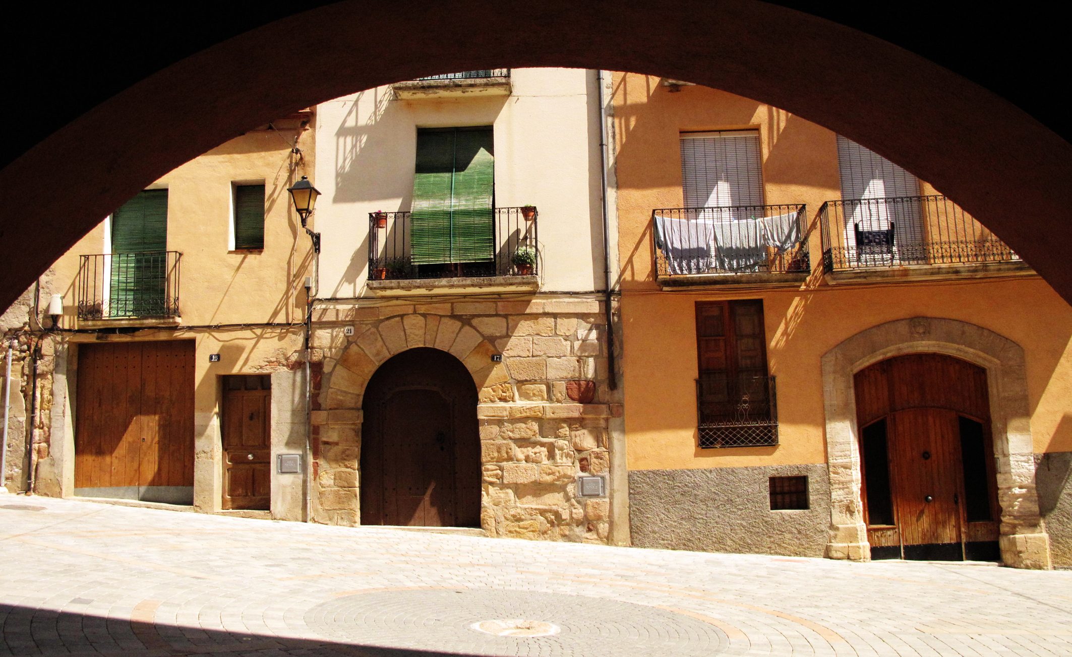 Plaça d'Àngel Marquès (Falset)